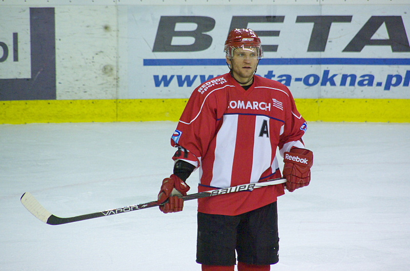 Leszek Laszkiewicz w barwach ComArch Cracovii podczas piątego meczu finałowego o Mistrzostwo Polski 2011/2012 z Ciarko PBS Bank Sanok (Arena Sanok, 14 marca 2012)